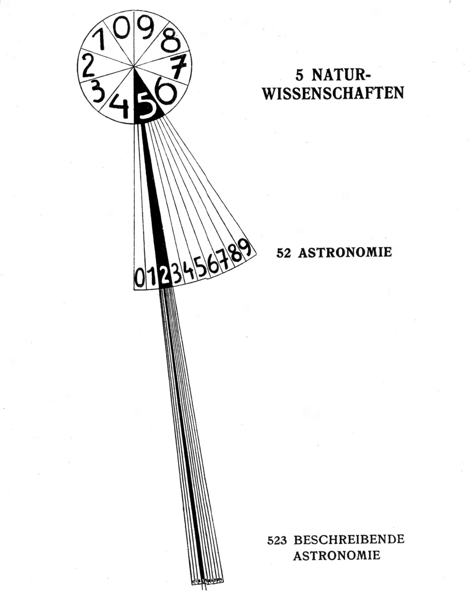 Beispiel für Systematik Astronomie Abb. in: Karl Wilhelm Bührer und Adolf Saager, Die Welt-Registratur. Das Melvil-Deweysche Dezimal-System, München 1912.